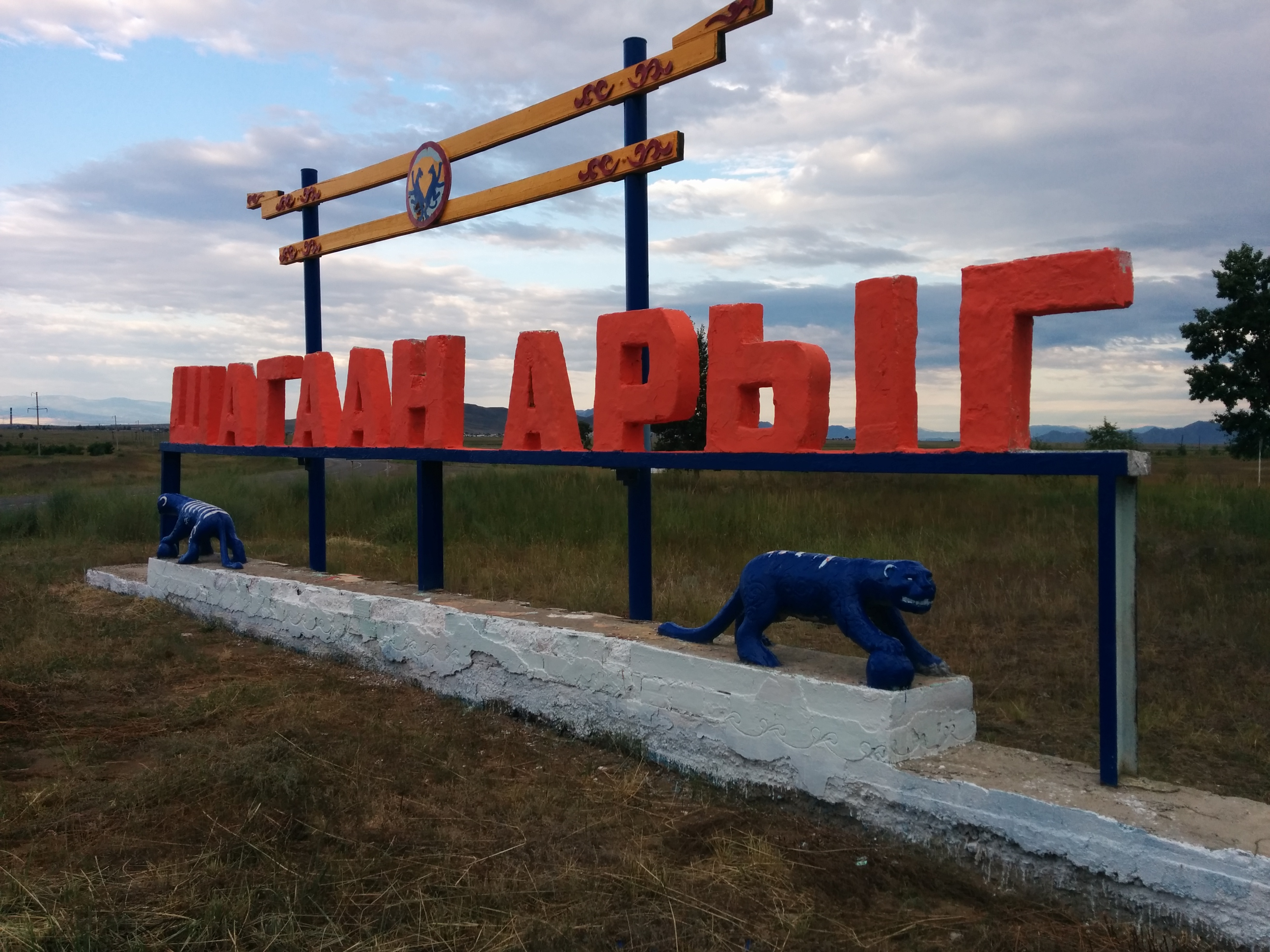 Тыва дыл: Шагаан-Арыг хоорайже Кызыл хоорайдан кирер көрүжү